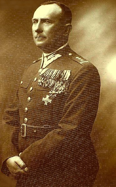 płk. Antoni_Bogusławski, 24 Pułk Ułanów, ok. po 1928.